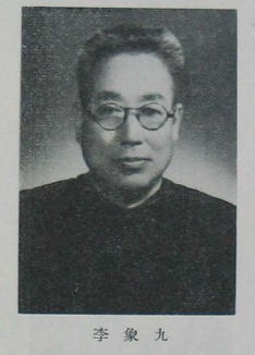 中文（台灣）: 中國人民政治協商會議第一屆全體會議代表